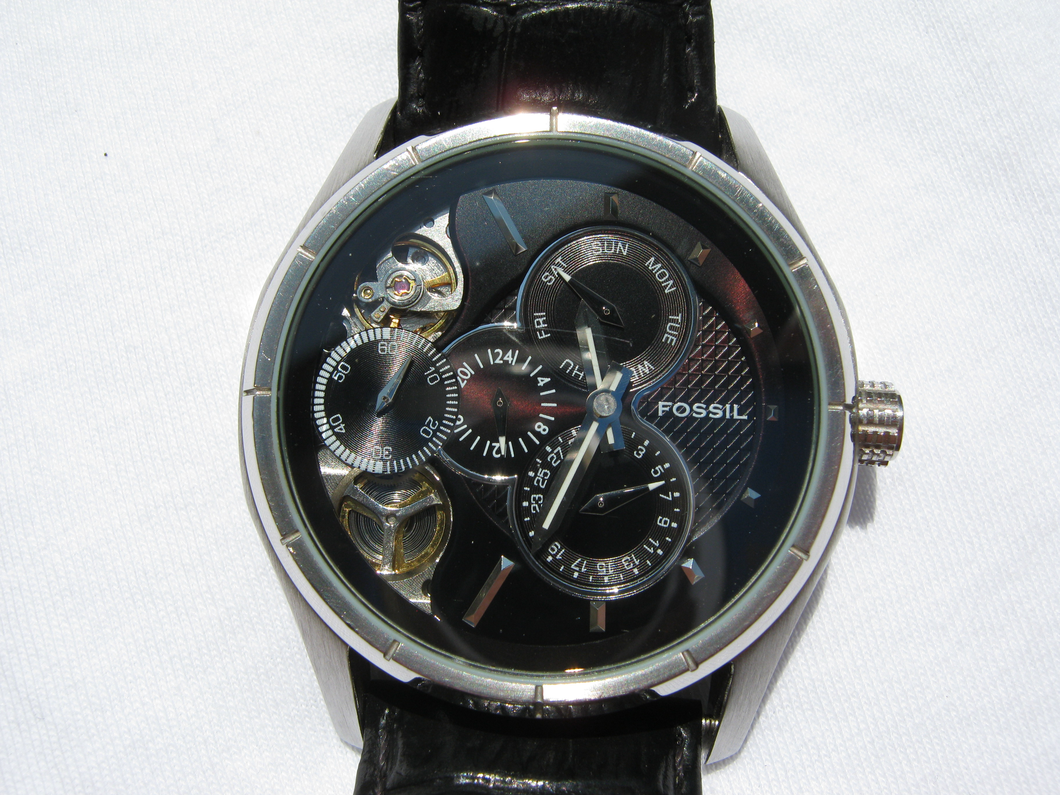 Lep ručni sat kompanije Fossil, star četiri godine.